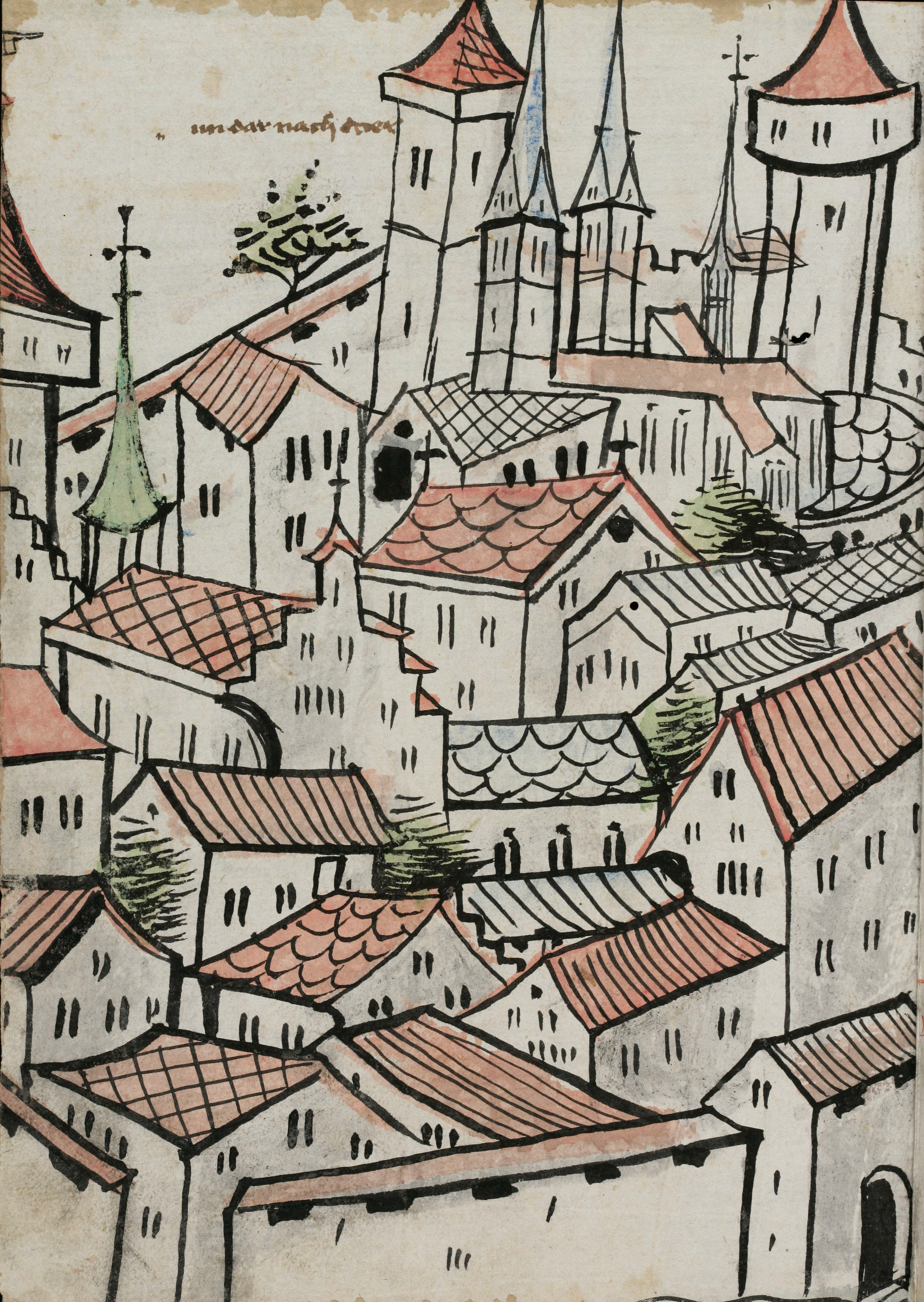 Ansicht von Konstanz, Handschrift von Gebhard Dachers Konstanzer Chronik, Cod. Sang. 646, p. 18